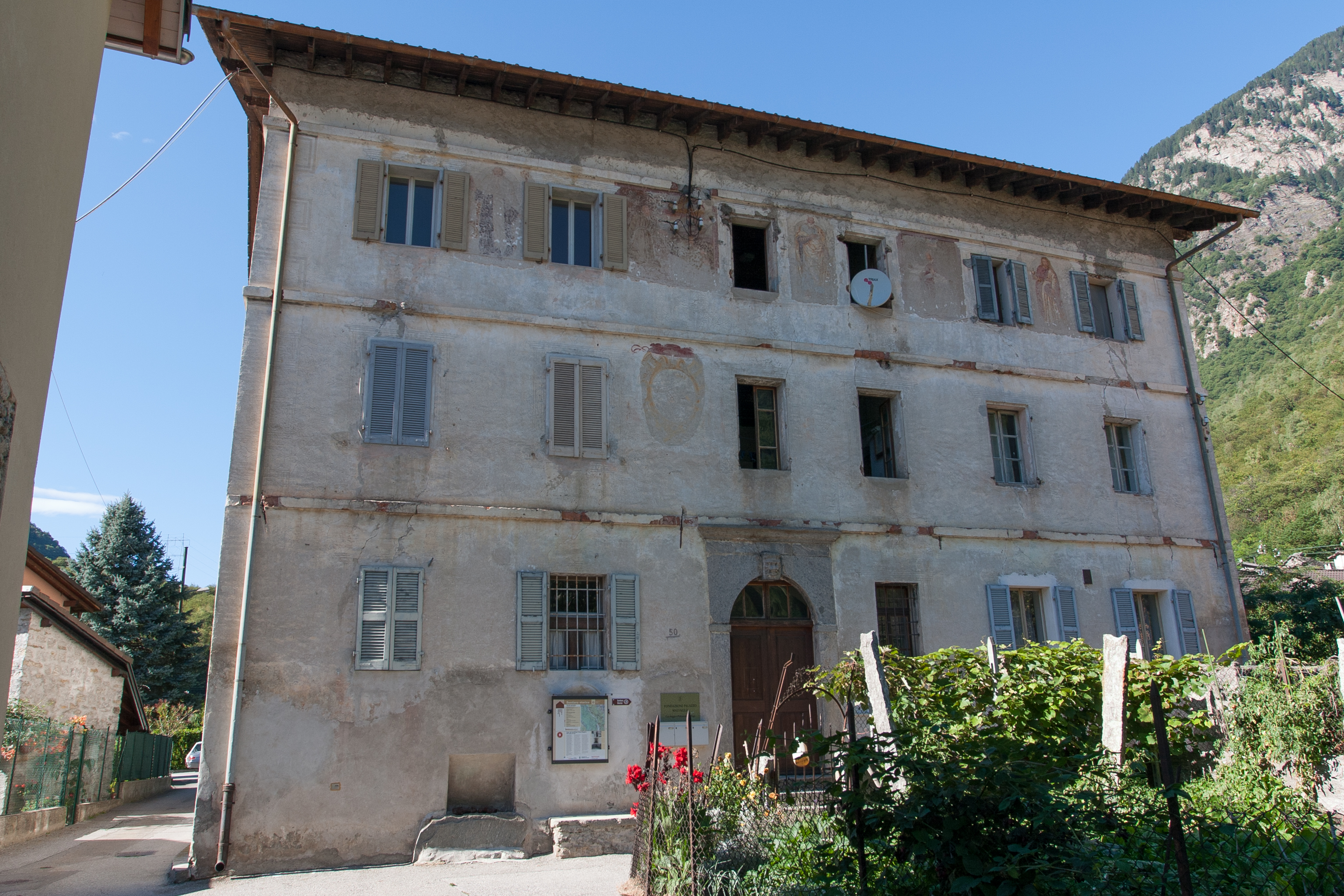 Landvogthaus - Malvaglia